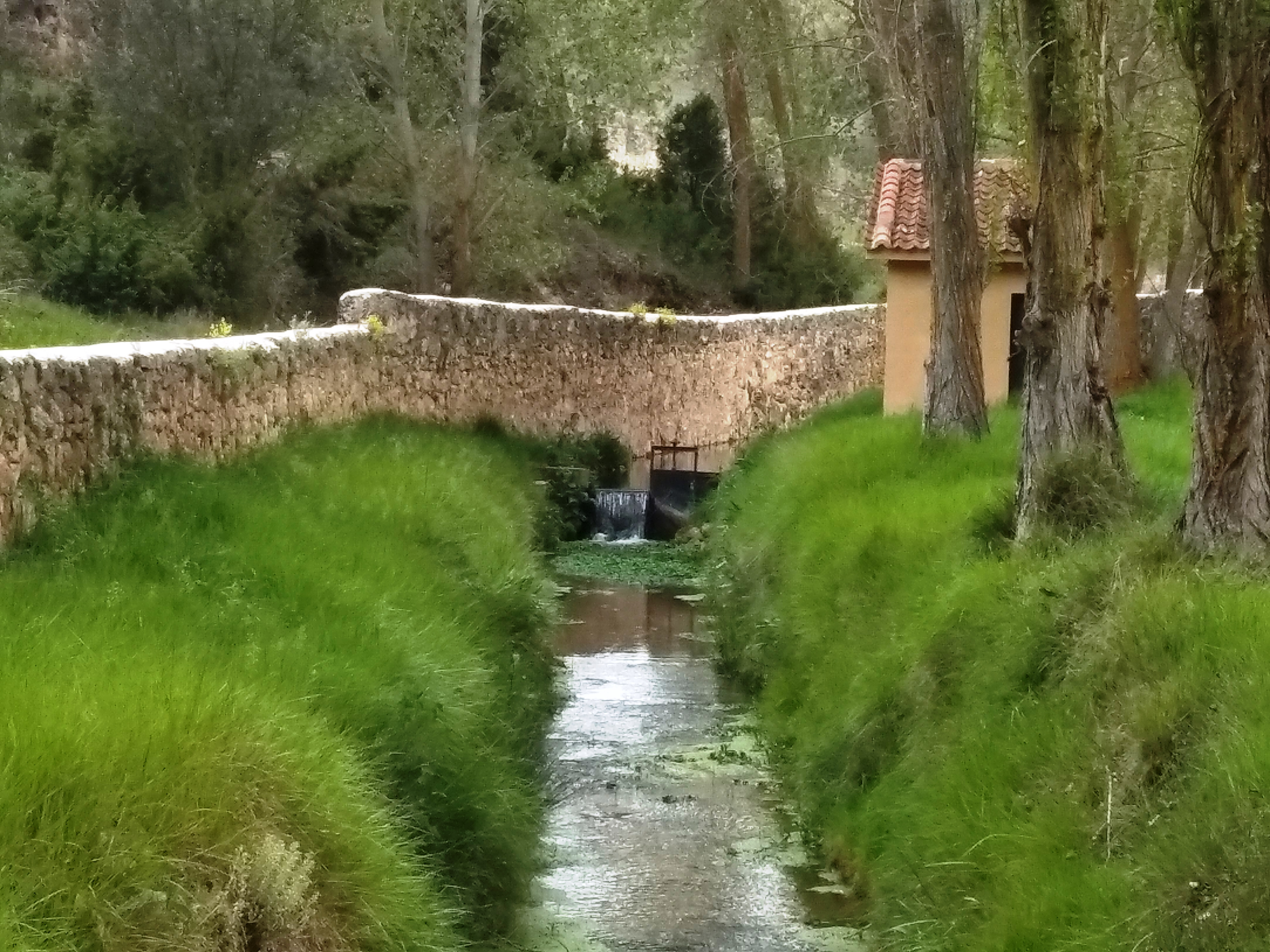 Fotografía de la Fuente manantial Fresnera, ubicada en Caballar (Segovia, España). En primer plano, se observa el canal por el que discurre el agua.